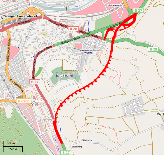 Verlauf des Schindhautunnels (B27 in Höhe Tübingen)